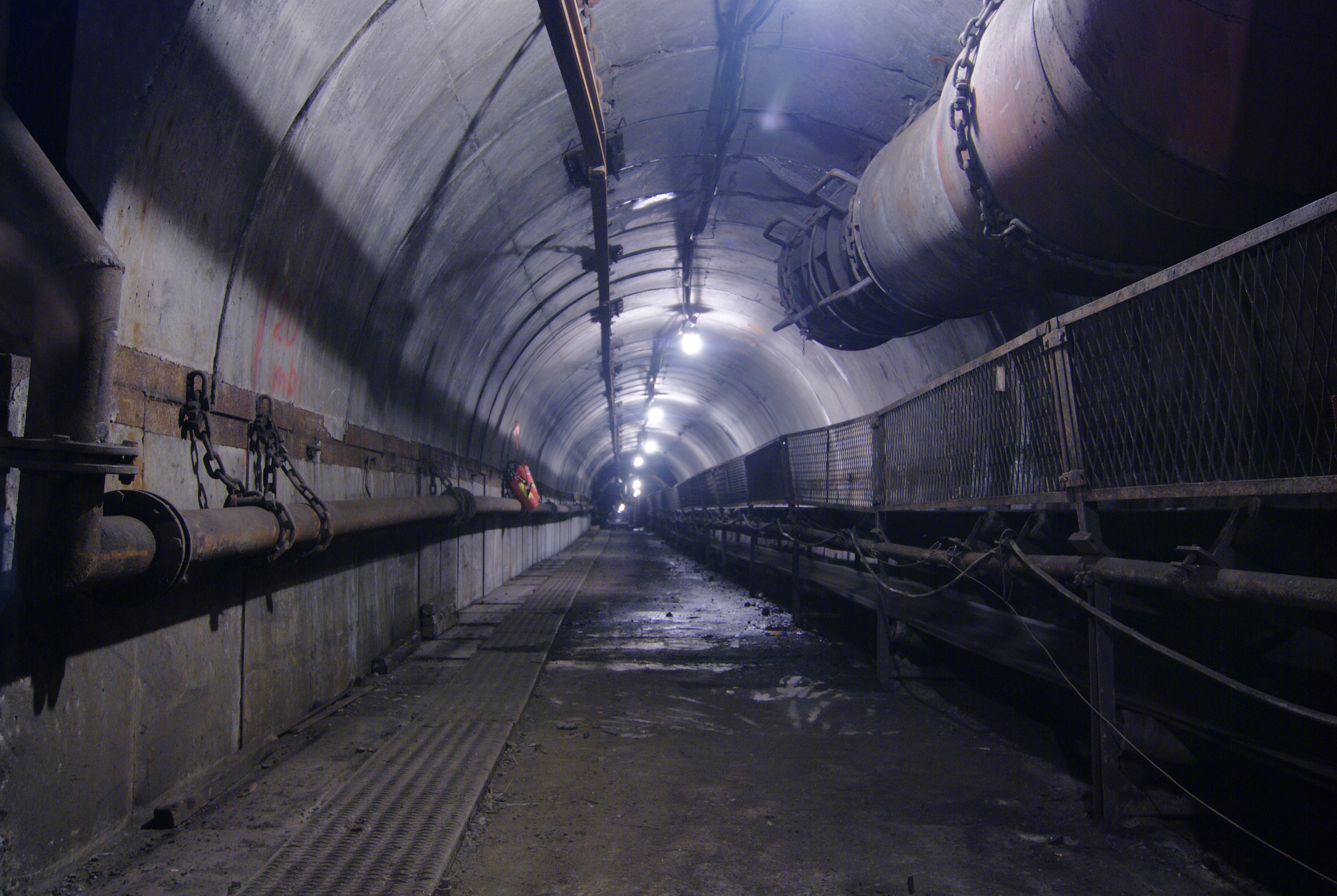 Zakład Górniczy Siltech. Widok w głąb upadowej.